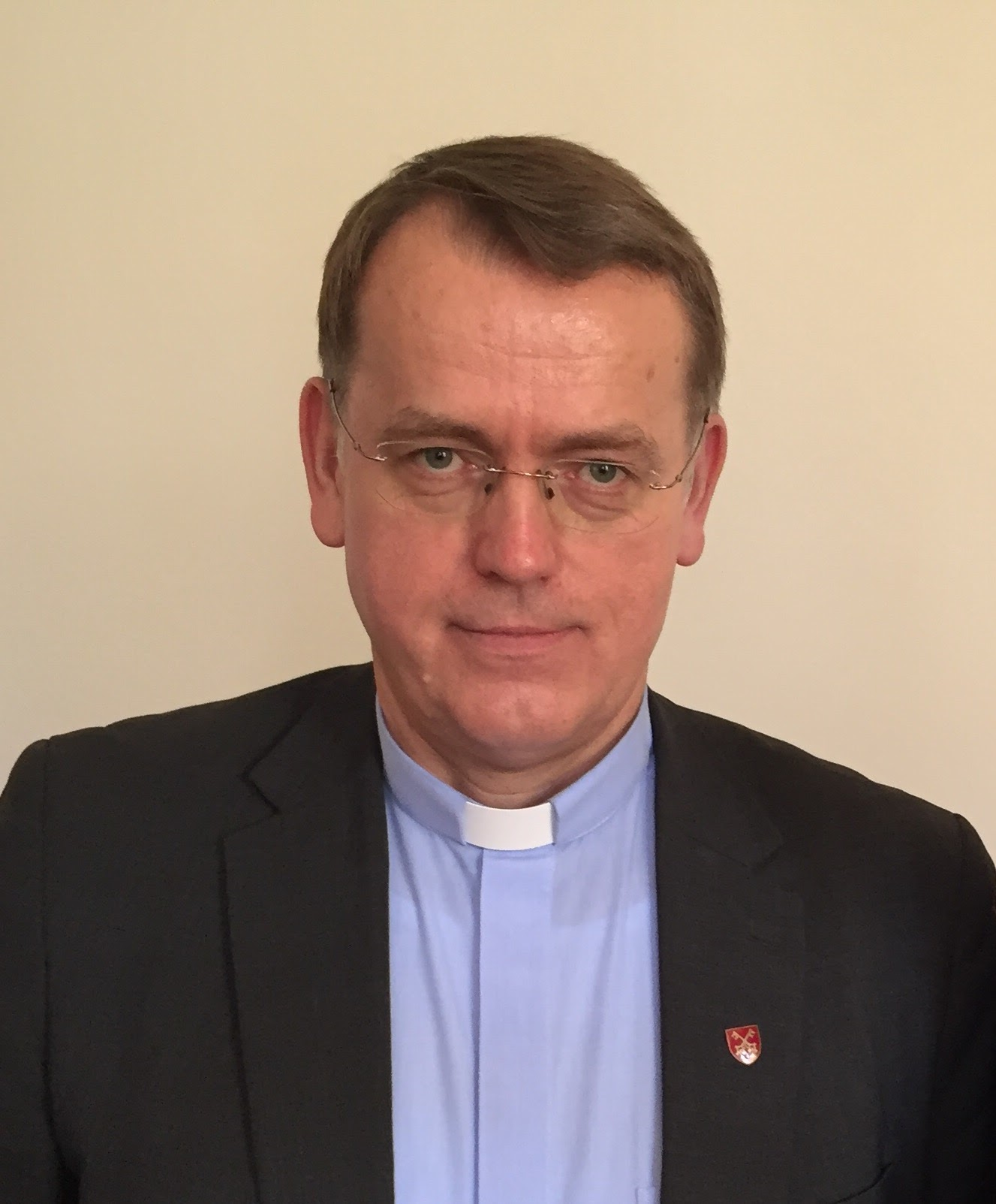 Ks. Prof. Dariusz Oko.